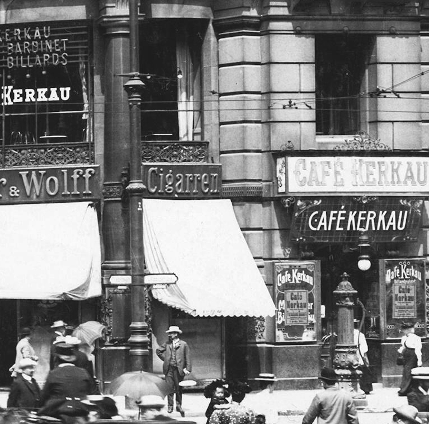 Aus dem Bild "Friedrichstraße Ecke Leipziger Straße 101/102" mit dem Equitable-Gebäude an der Nord-Ost-Ecke der Straßenkreuzung von 1907 - einer Fotografie von Max Missmann - wurde aus dem Bild unten rechts ein Ausschnitt mit einem Berliner Straßenbrunnen aus der Eisengießerei Lauchhammer (Typ I) entnommen, die 1895-1897 in Berlin aufgestellt wurden. Der Brunnen steht mit Tränkstein am Gehwegrand vor dem Eingang zum Café Kerkau im Erdgeschoss des Geschäftsgebäudes der Equitqble-Versicherung. Das Bild in seiner Gesamthat zeigt debn Blick in die Friedrichstrße nach Norden, östliche Straßenseite.